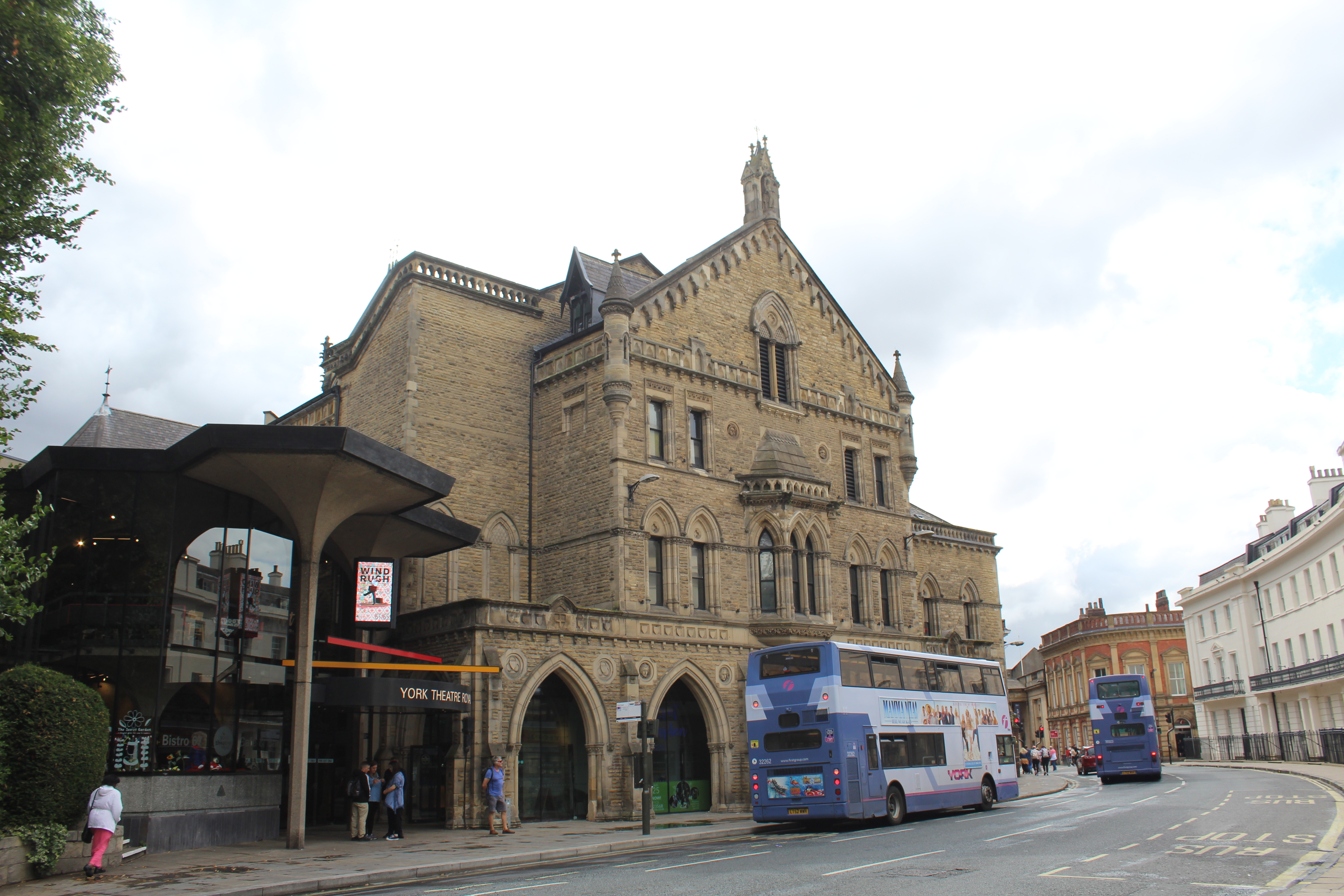 Théâtre Royal d'York.